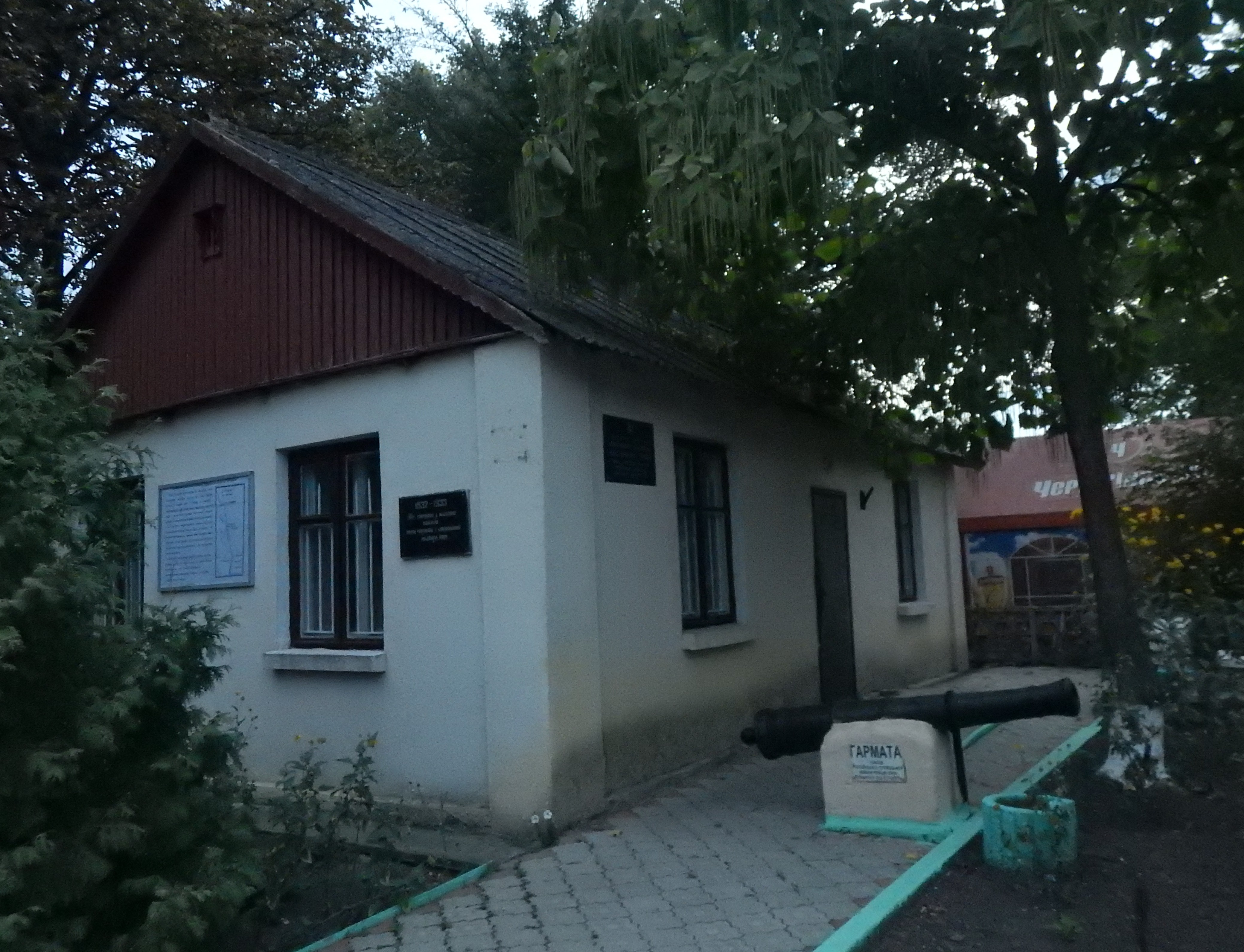 Будівля Народного історико-краєзнавчого музею у смт Захарівка, Одеська область. Вікіекспедиція на північ Одещини